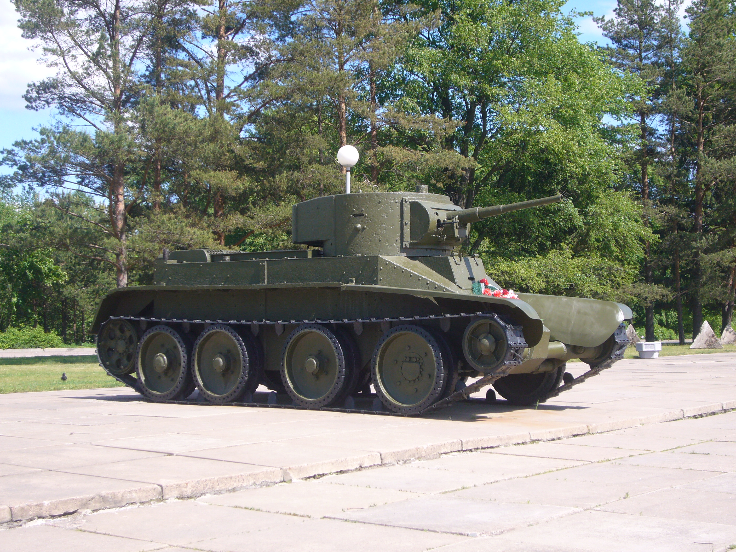 БТ-5 у диорамы «Прорыв блокады Ленинграда». Вид спереди-справа.